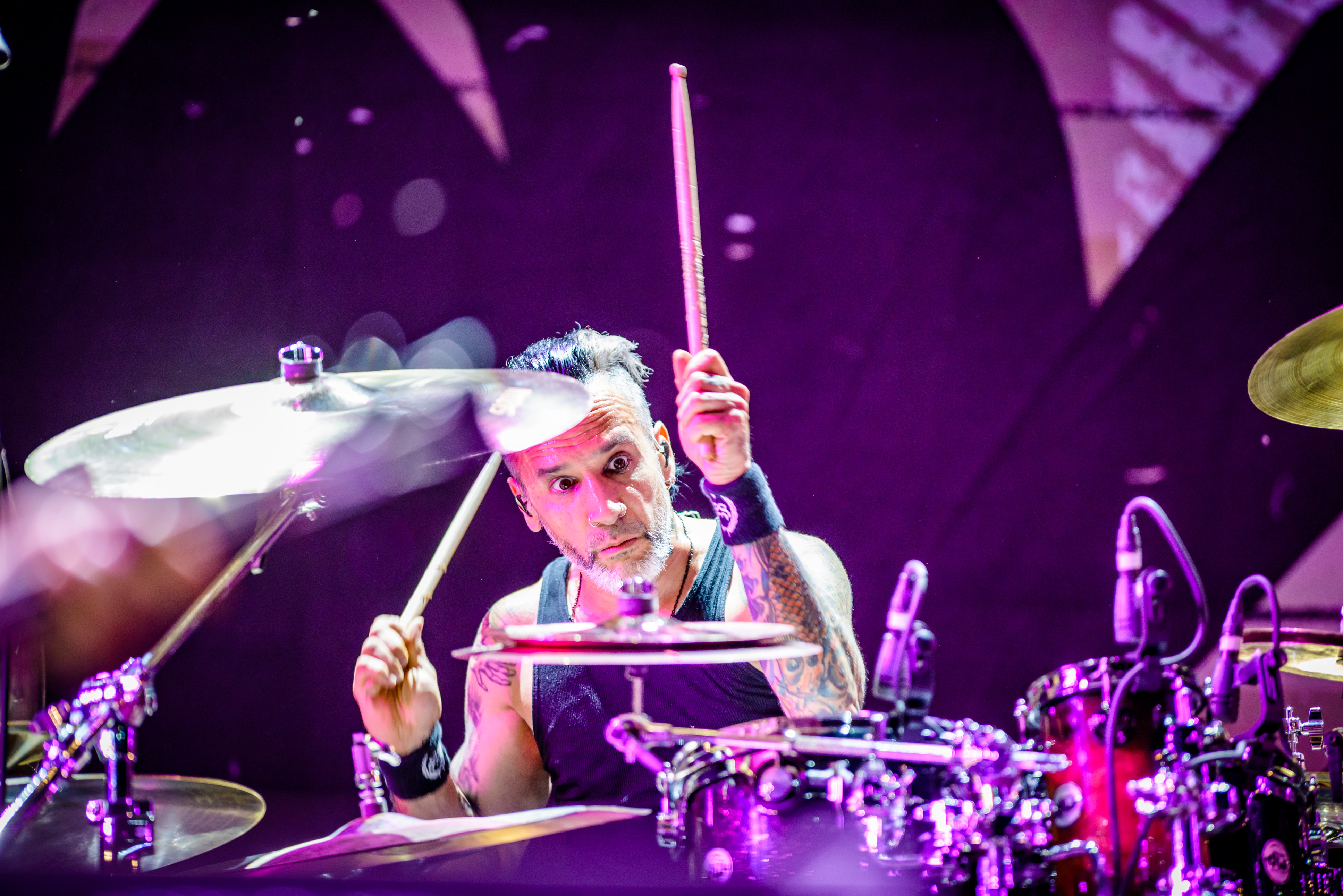 'Rock im Park 2018; Zeppelinfeld Nürnberg': 'Stone Sour'